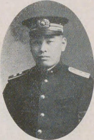 高野源進（1895-1969）